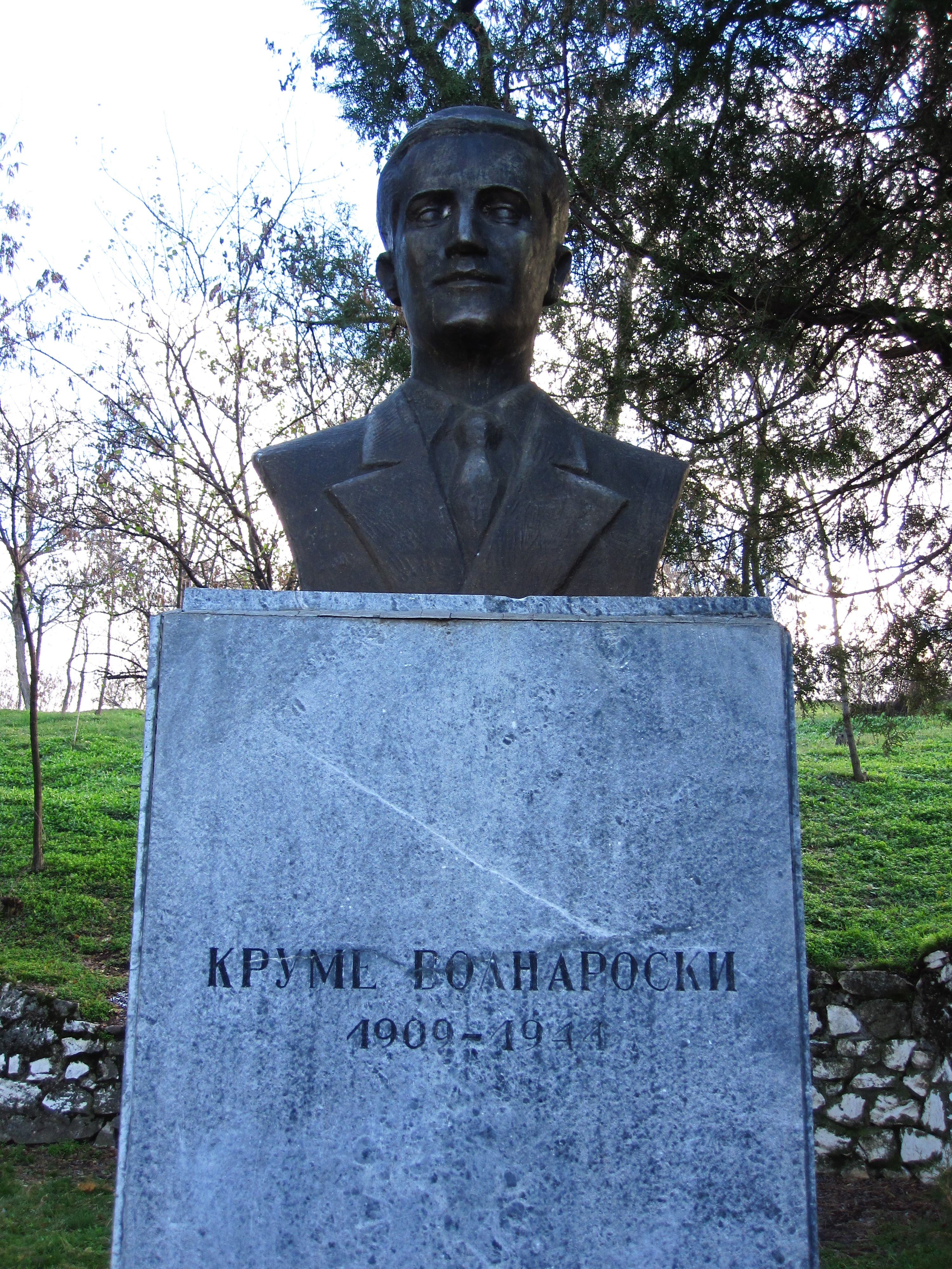 Биста - Круме Волнароски - Прилеп